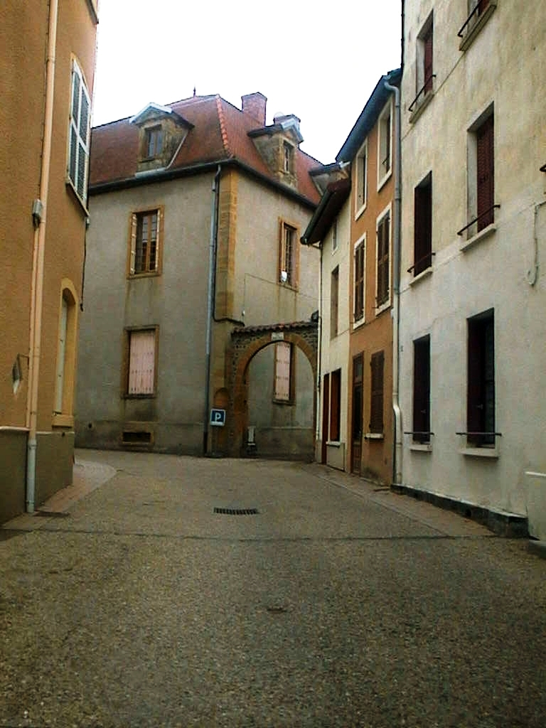 La maison des mansardes